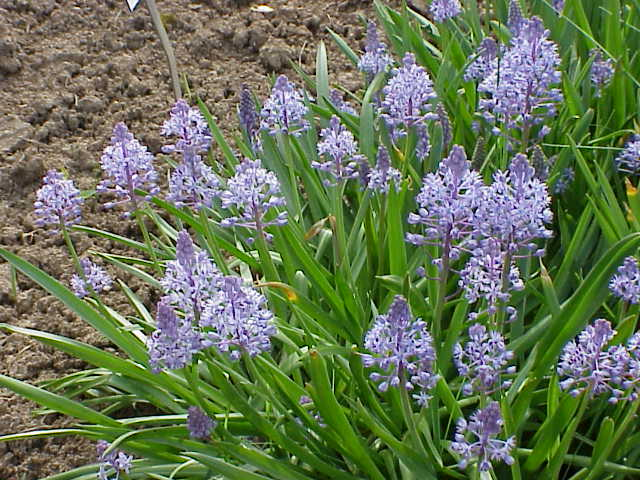 Species: Scilla litardierei (syn. Scilla pratensis) Family: Liliaceae Image No. 2